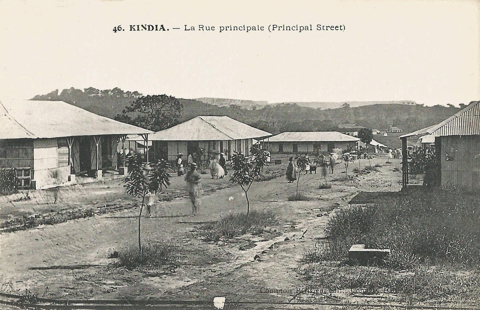 46. Guinée Française. Kindia. La Rue principale.